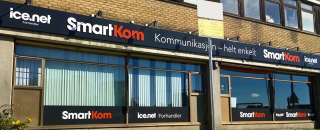 SmartKoms filial på Økern.